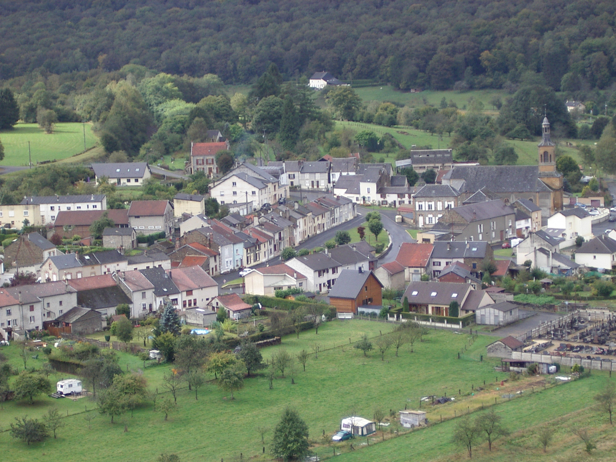 Joigny-sur-Meuse est une commune située dans le departement des Ardennes, France